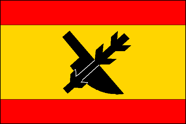 vlajka, Oslnovice, okres Znojmo